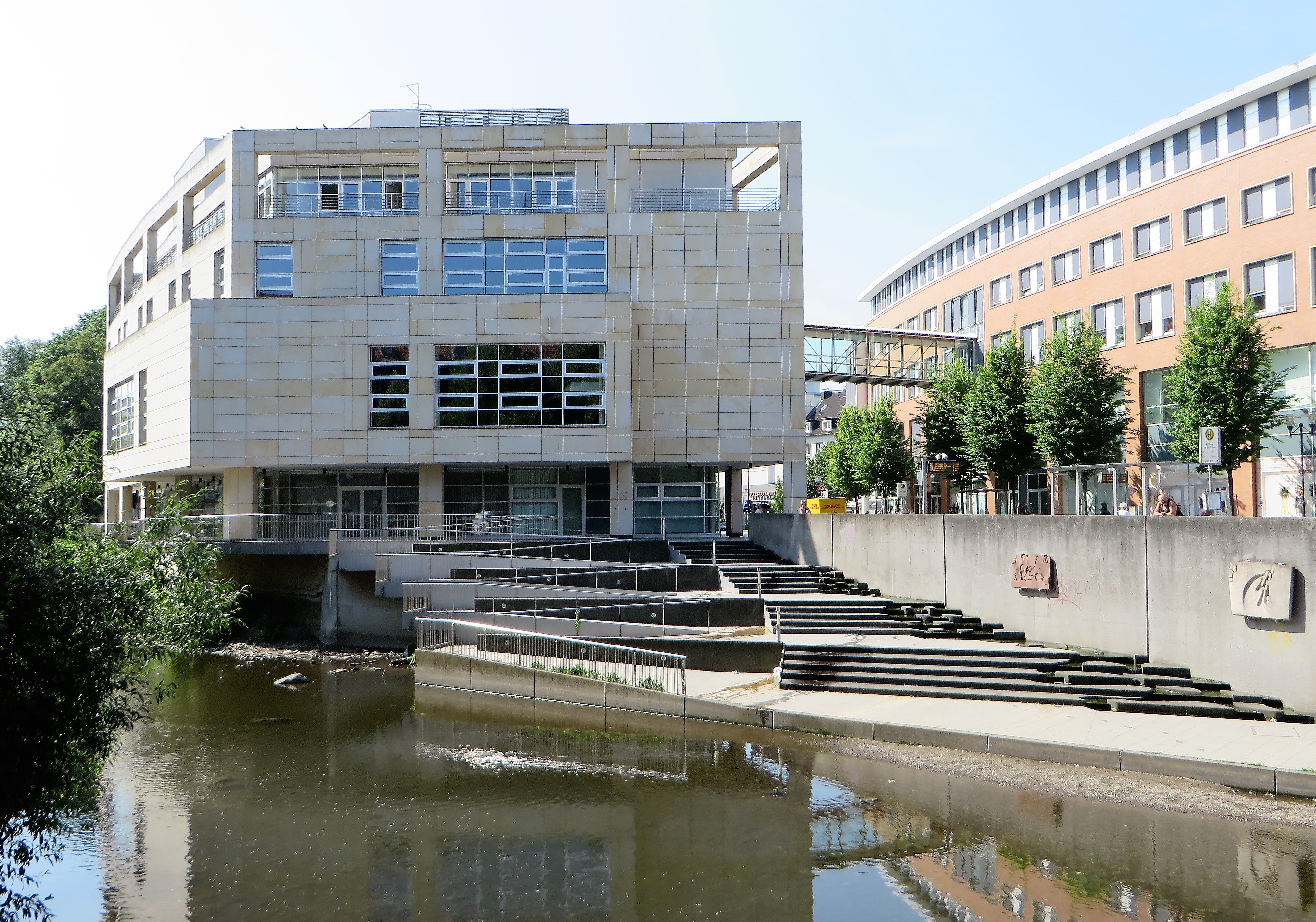 Rathaus an der Volme in Hagen. Blick vom Elbersufer. Erbaut 2002 bis 2004.